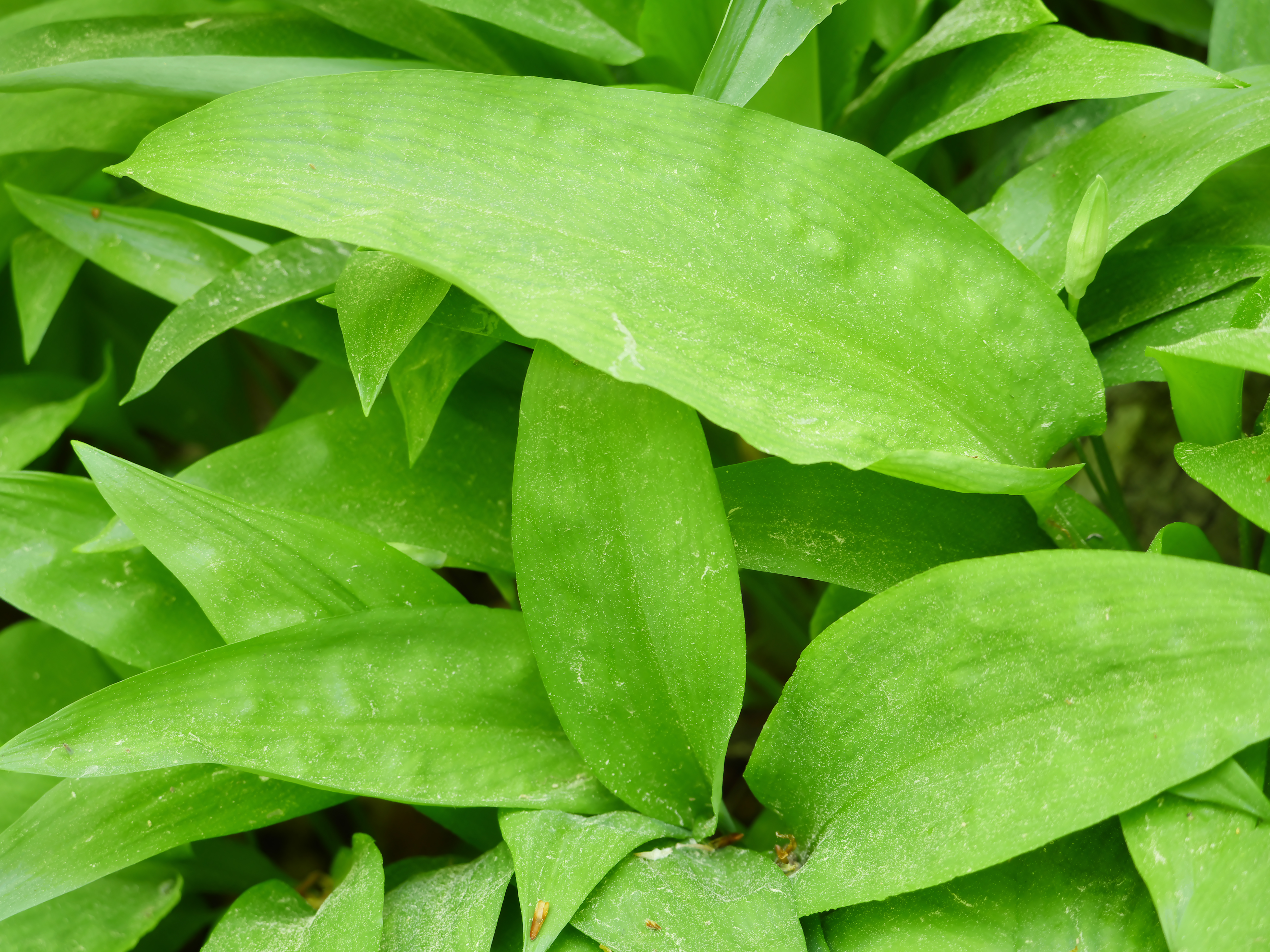 Nationalpark Hainich, Bärlauch-Blätter